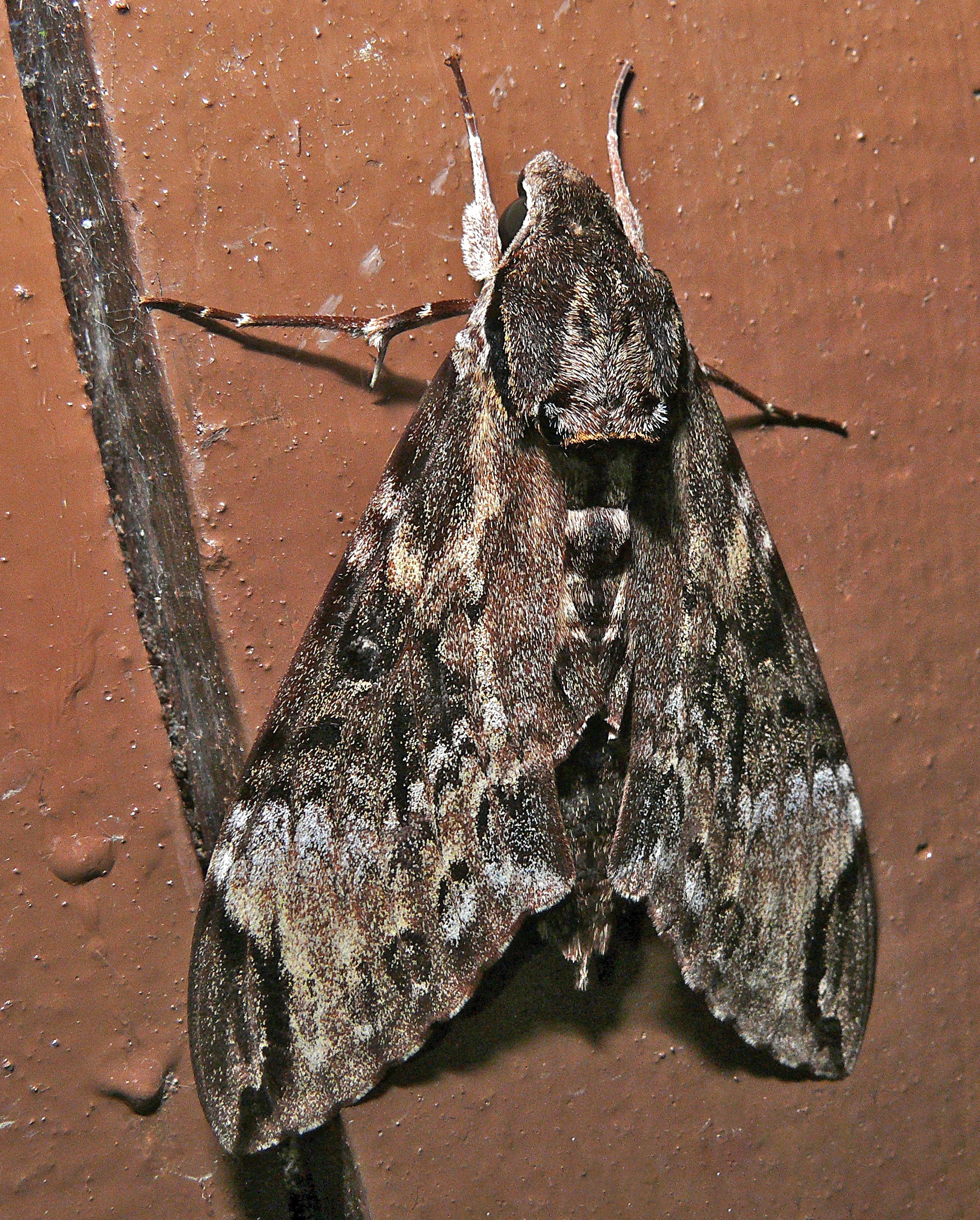 Mount Kinabalu NP, Sabah, MALAYSIA